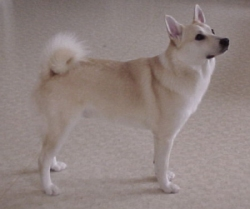 Norwegian Buhund